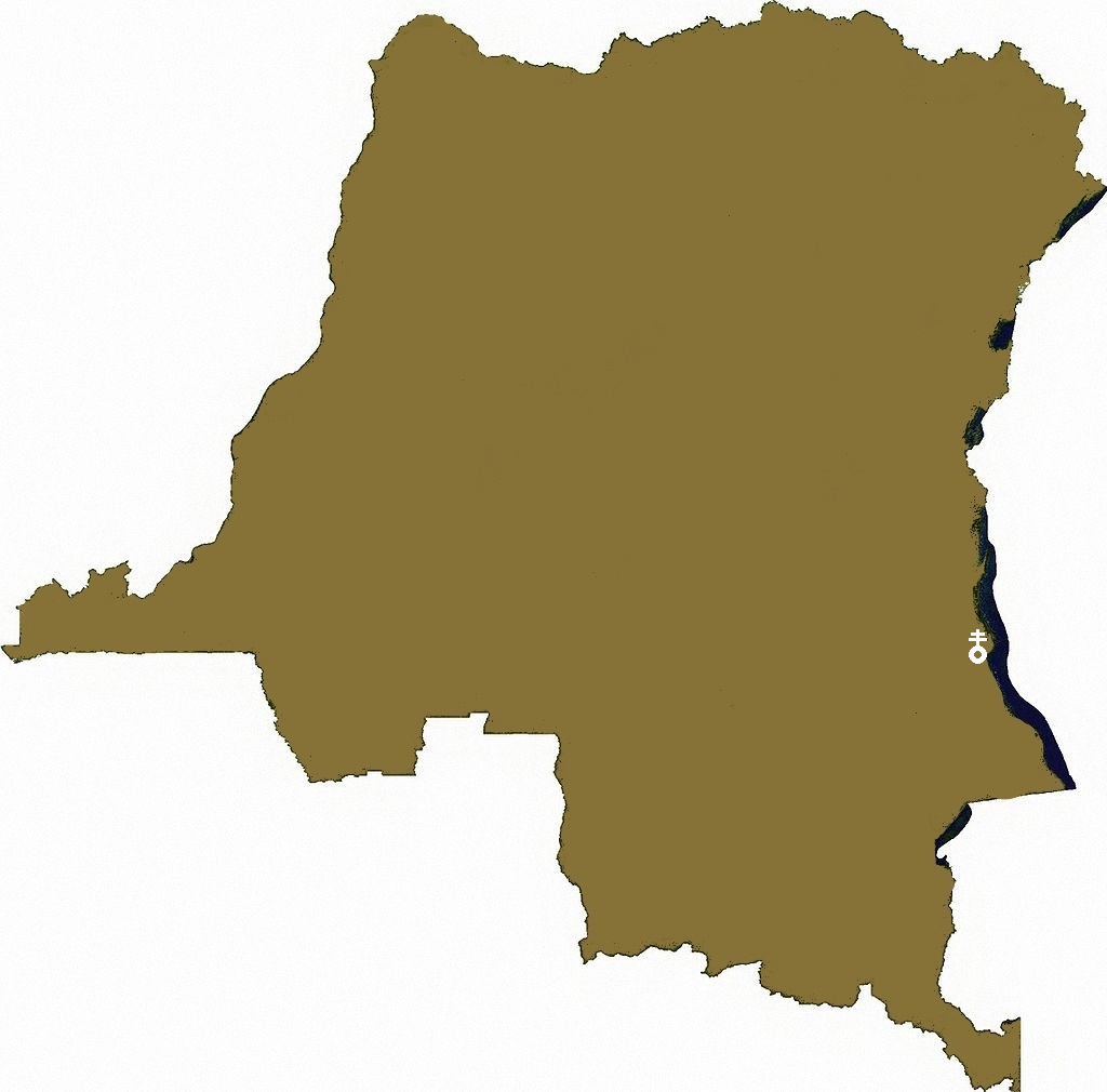 map congo